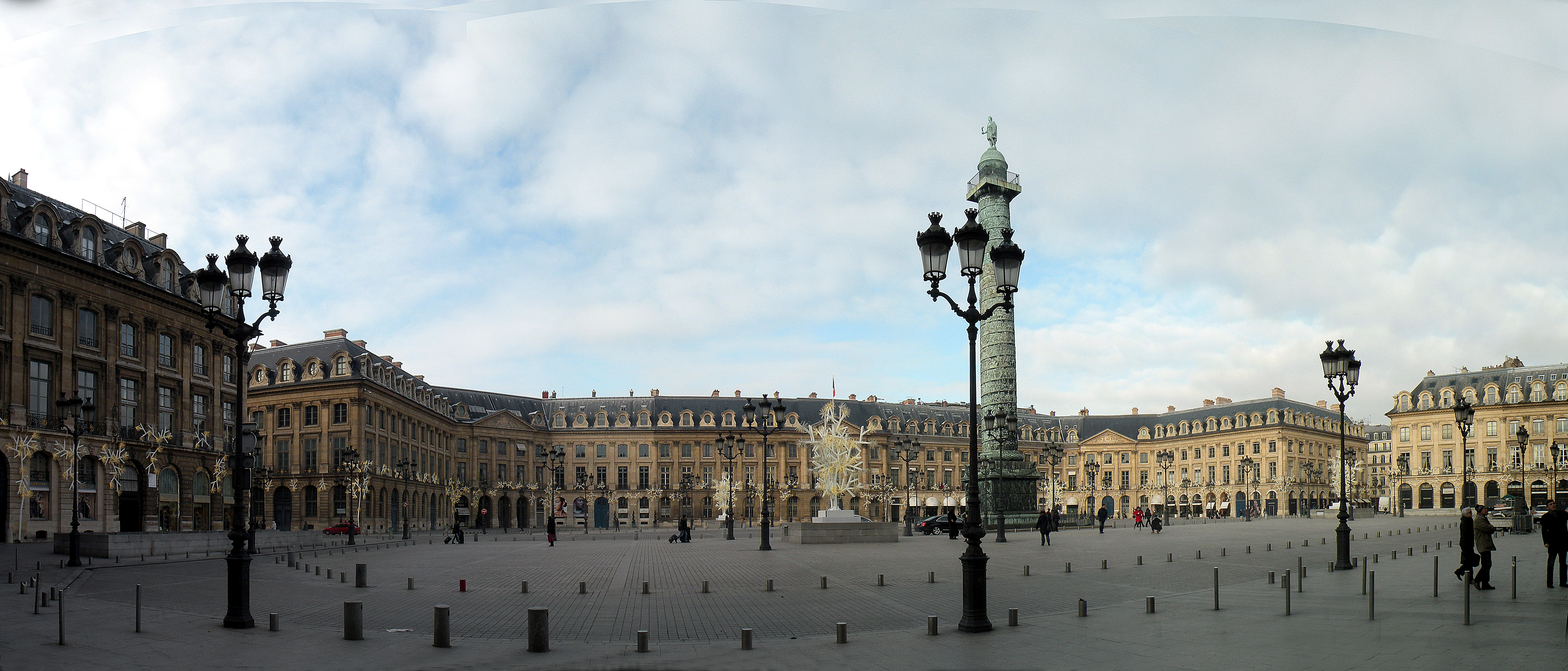 Вандомская площадь:колонна и отель "Риц"